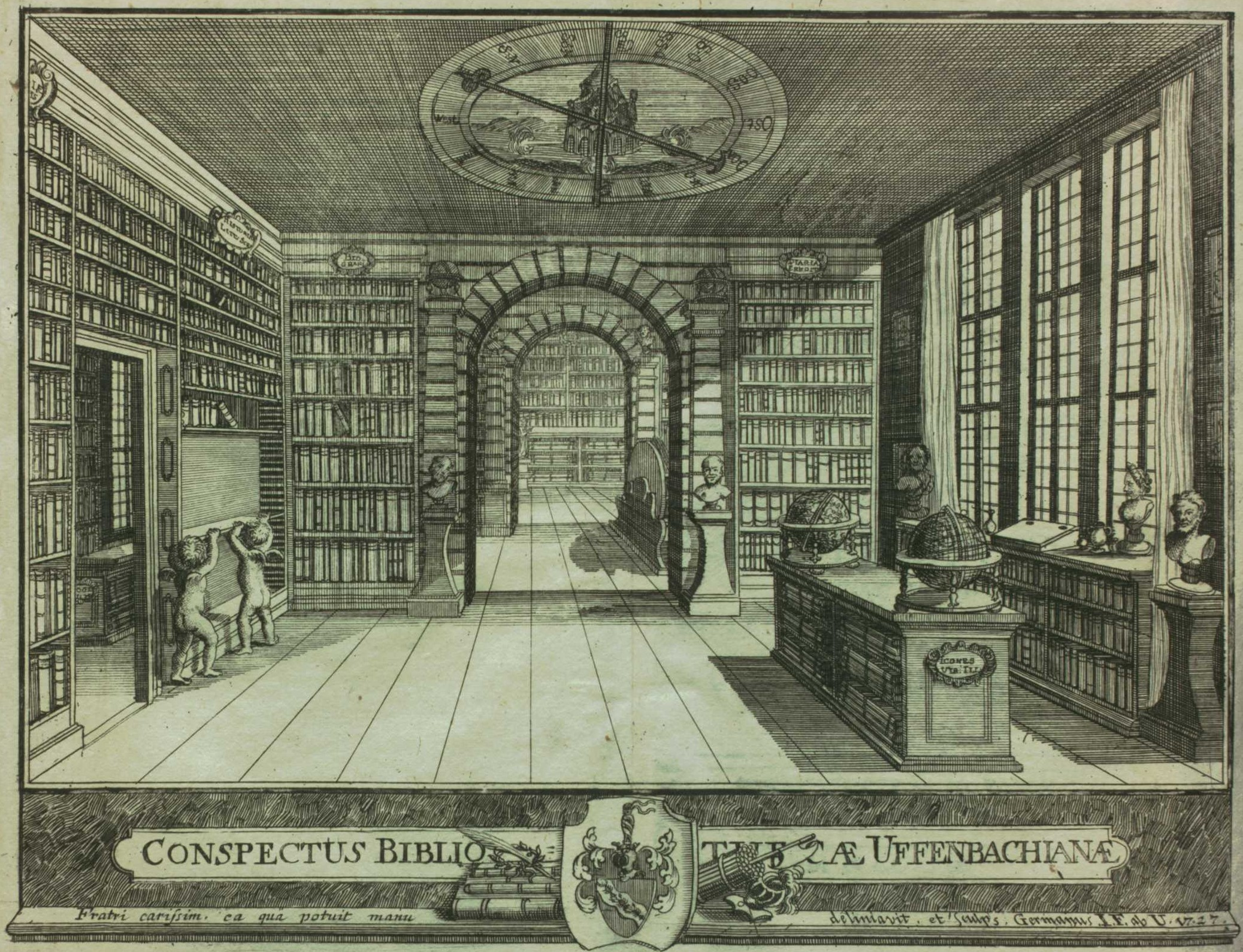 Stich der Uffenbachschen Bibliothek (Zacharias Konrad Uffenbach (1683-1734)) / Engraving of the Library of Zacharias Konrad Uffenbach (1683-1734)